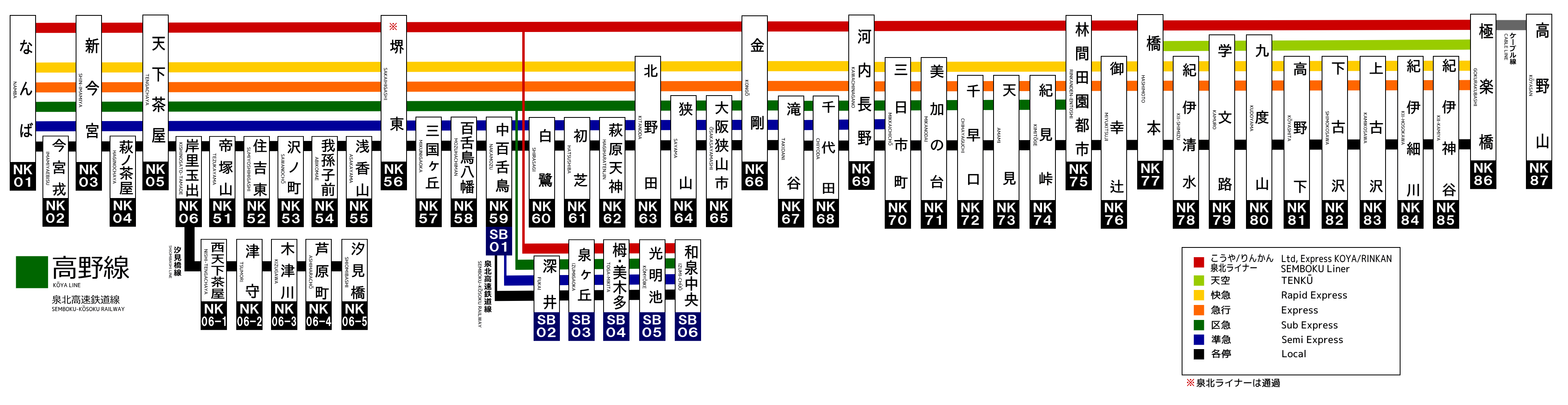 南海高野線停車駅表